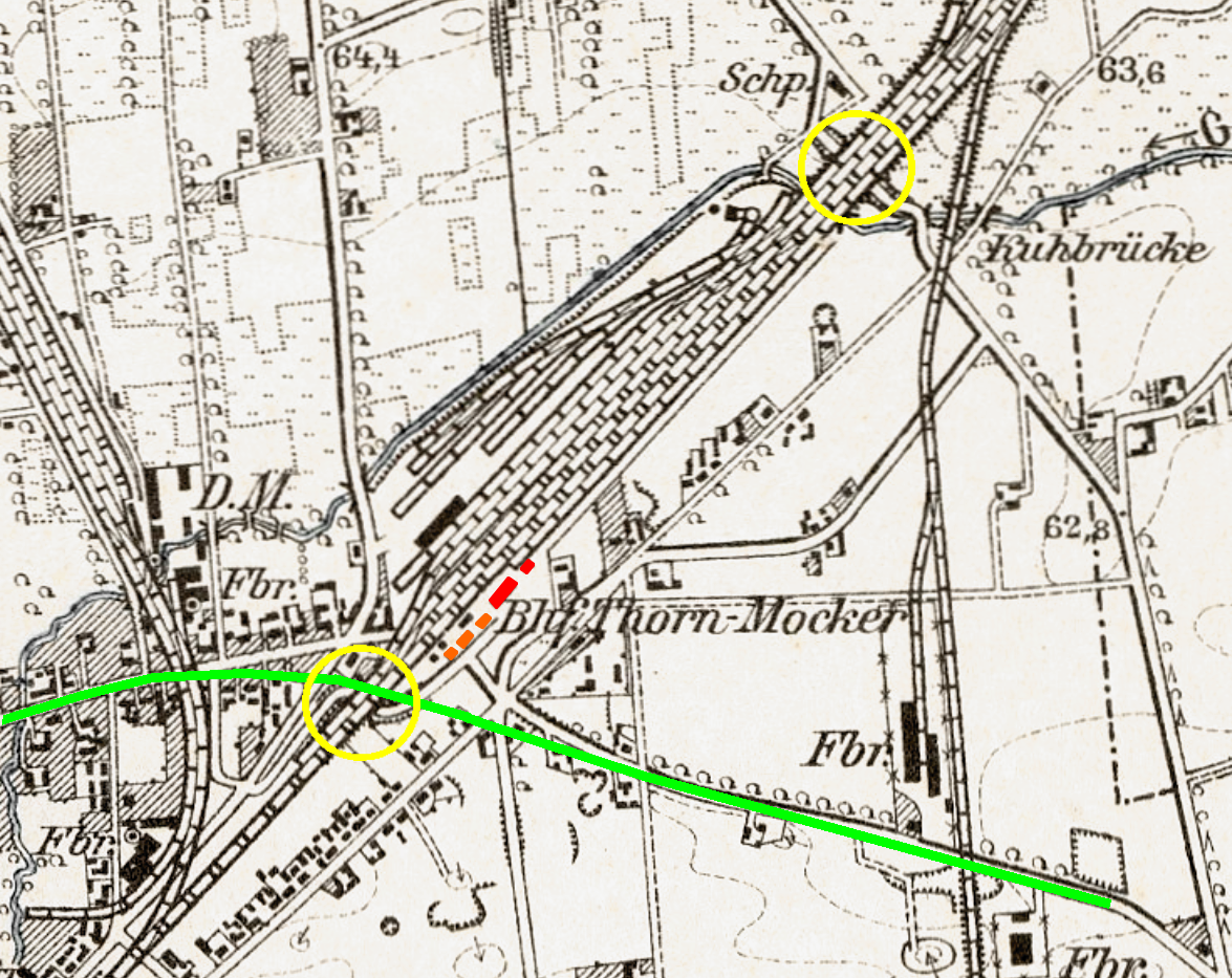 Okolice Dworca Toruń Wschodni (Toruń Mokre) na planie miasta z 1909 roku. Czerwony - główne budynki dworca Pomarańczowy - kolejowe budynki mieszkalne Żółty - tunele pod torami Zielony - przybliżony obecny przebieg trasy Kościuszki-Żółkiewskiego